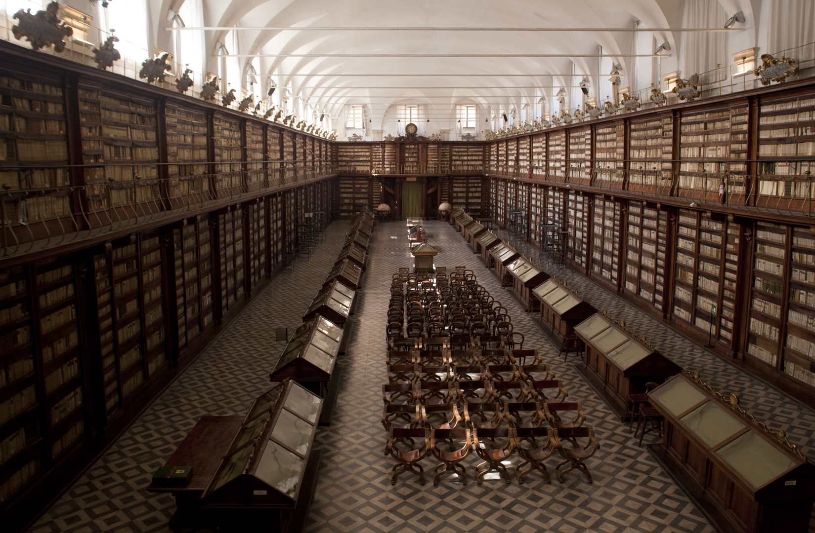 Biblioteca Casanatense - MIBAC This is a photo of a monument which is part of cultural heritage of Italy.